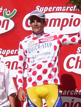 Richard Virenque, in maglia a pois di leader della classifica GPM, all'arrivo dell'8a tappa del Tour de France 2003, Sallanches - L'Alpe d'Huez.